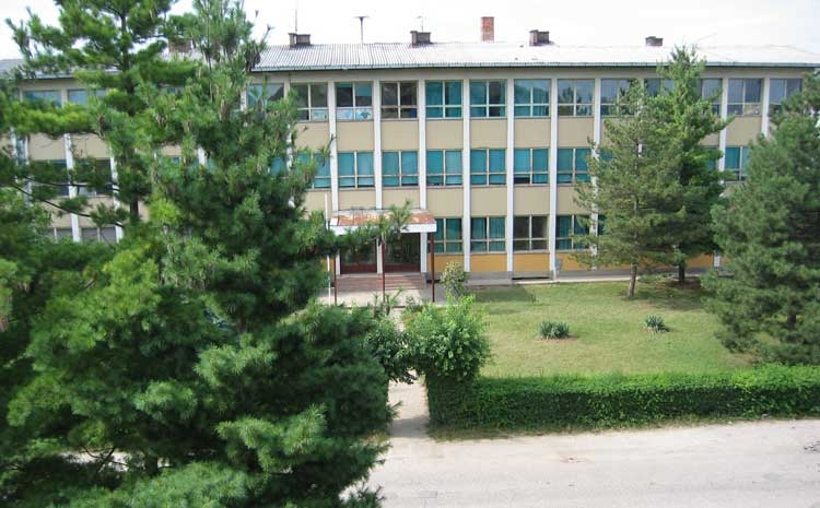 Основна школа „Xepoj Радмила Шишковић“